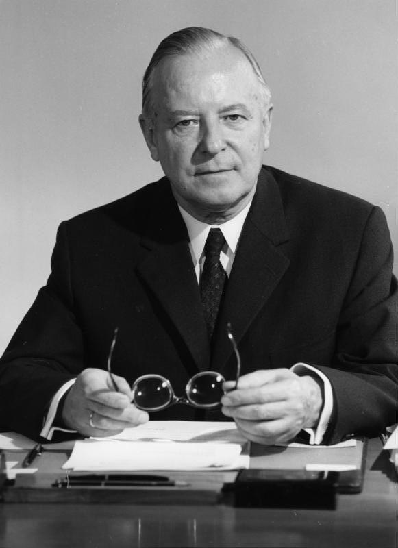 Franz Thedieck Staatssekretär Franz Thedieck, Ministerium für Gesamtdeutsche Fragen Abgebildete Personen: Thedieck, Franz: Staatssekretär im Bundesministerium für Gesamtdeutsche Fragen, Bundesrepublik Deutschland